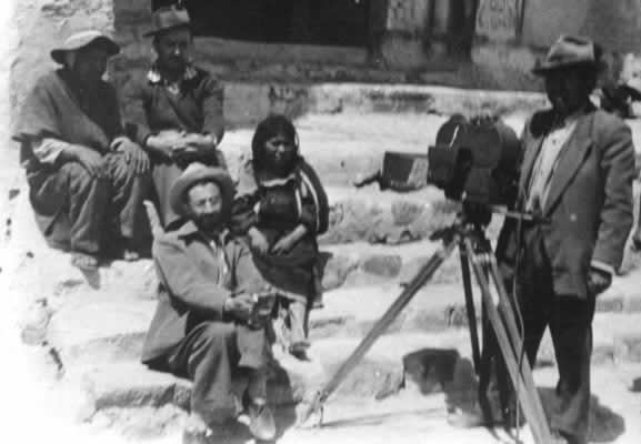 Filmación de "Vuelve Sebastiana" del cineasta boliviano Jorge Ruiz (1954)